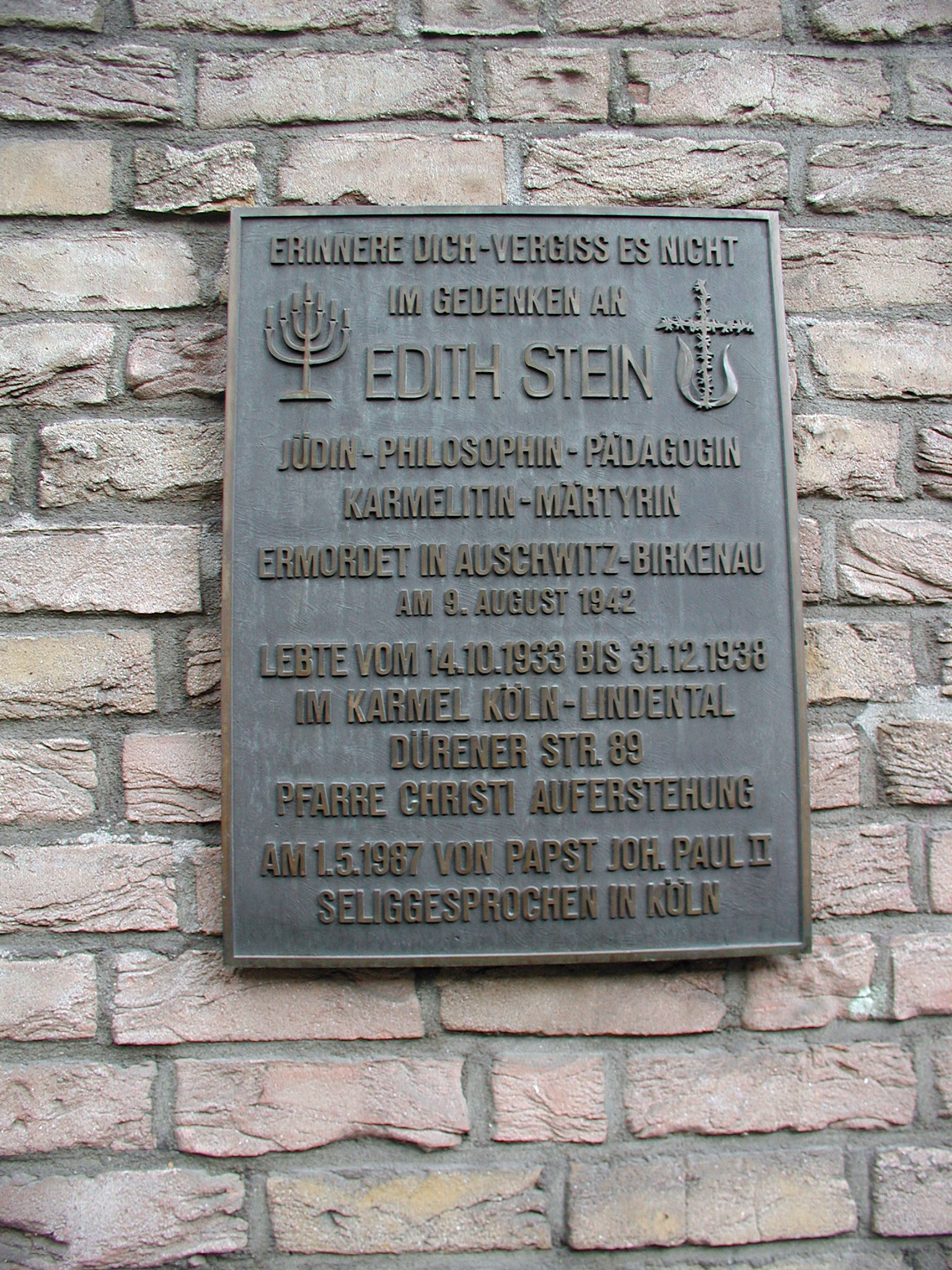 Köln Lindenthal, Edit Stein - Gedenktafel